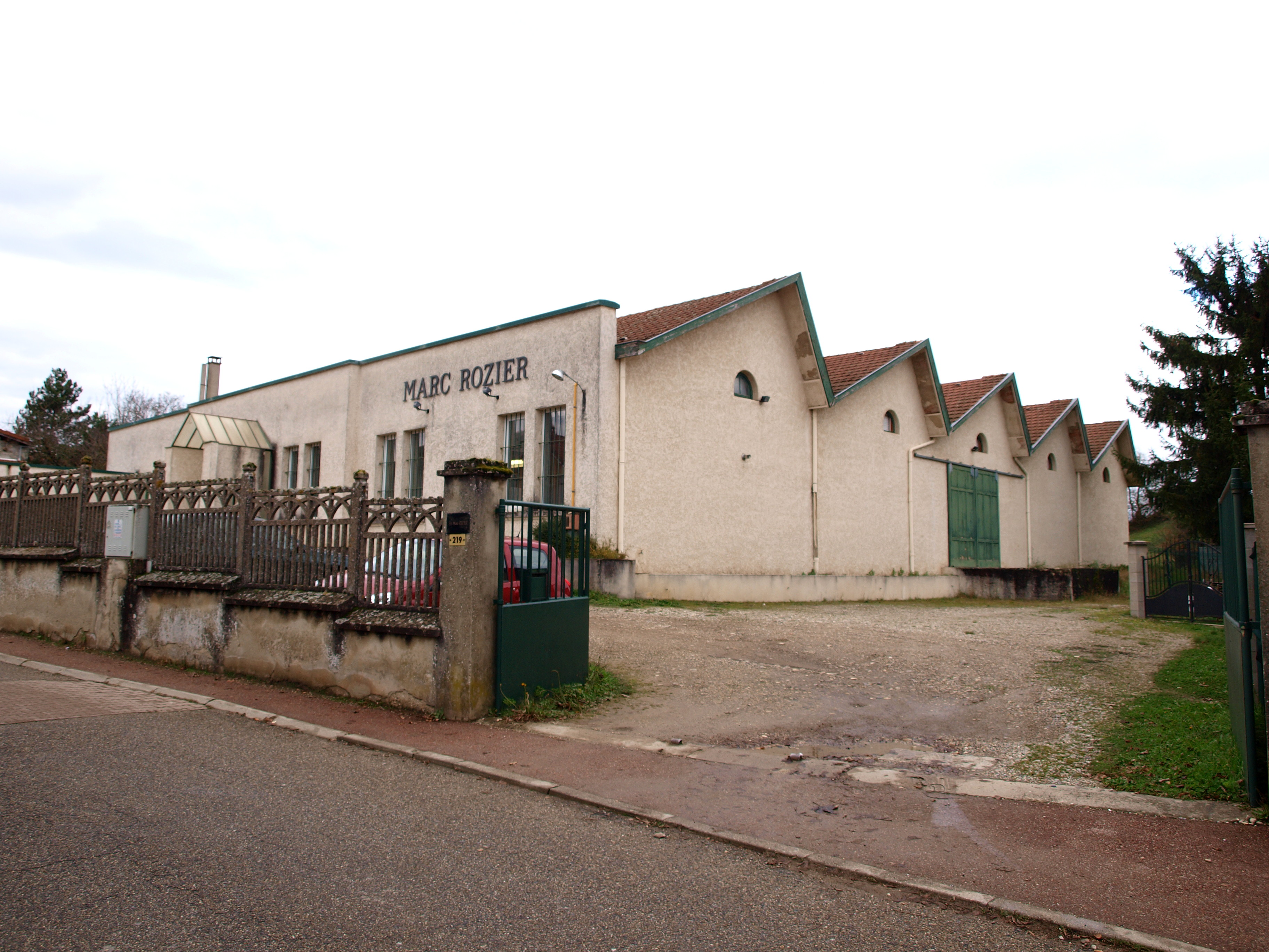 Meyrié (Isére, France)